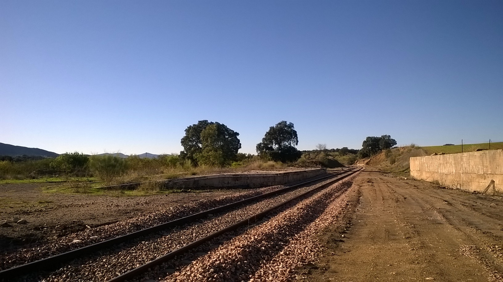 Restos de la antigua estación de Villanueva del Rey (Córdoba). A la derecha, el andén.